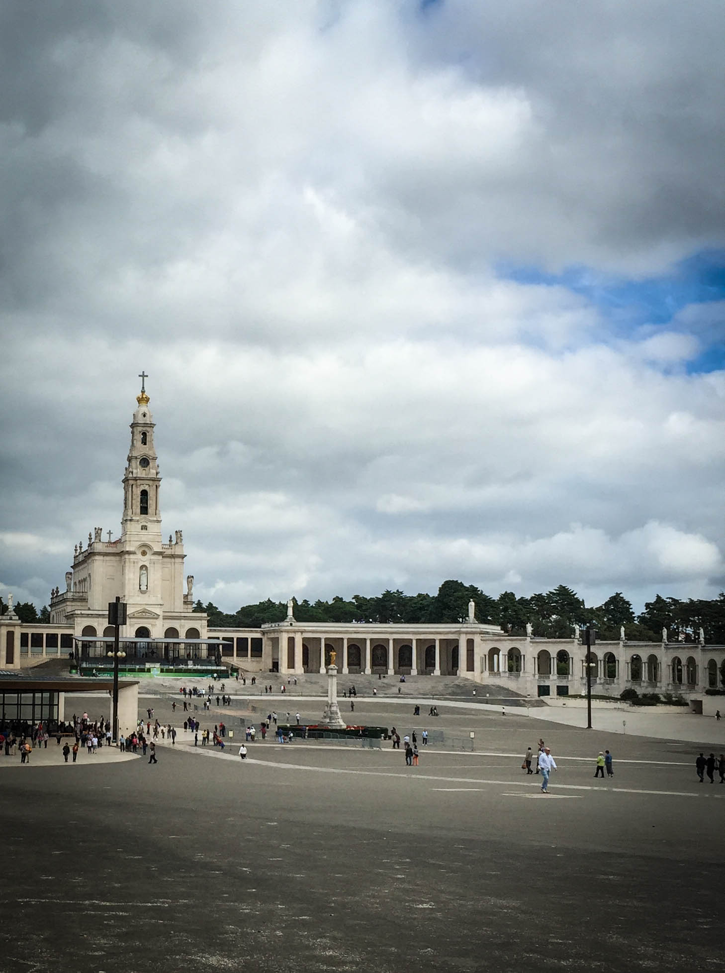 Fatima